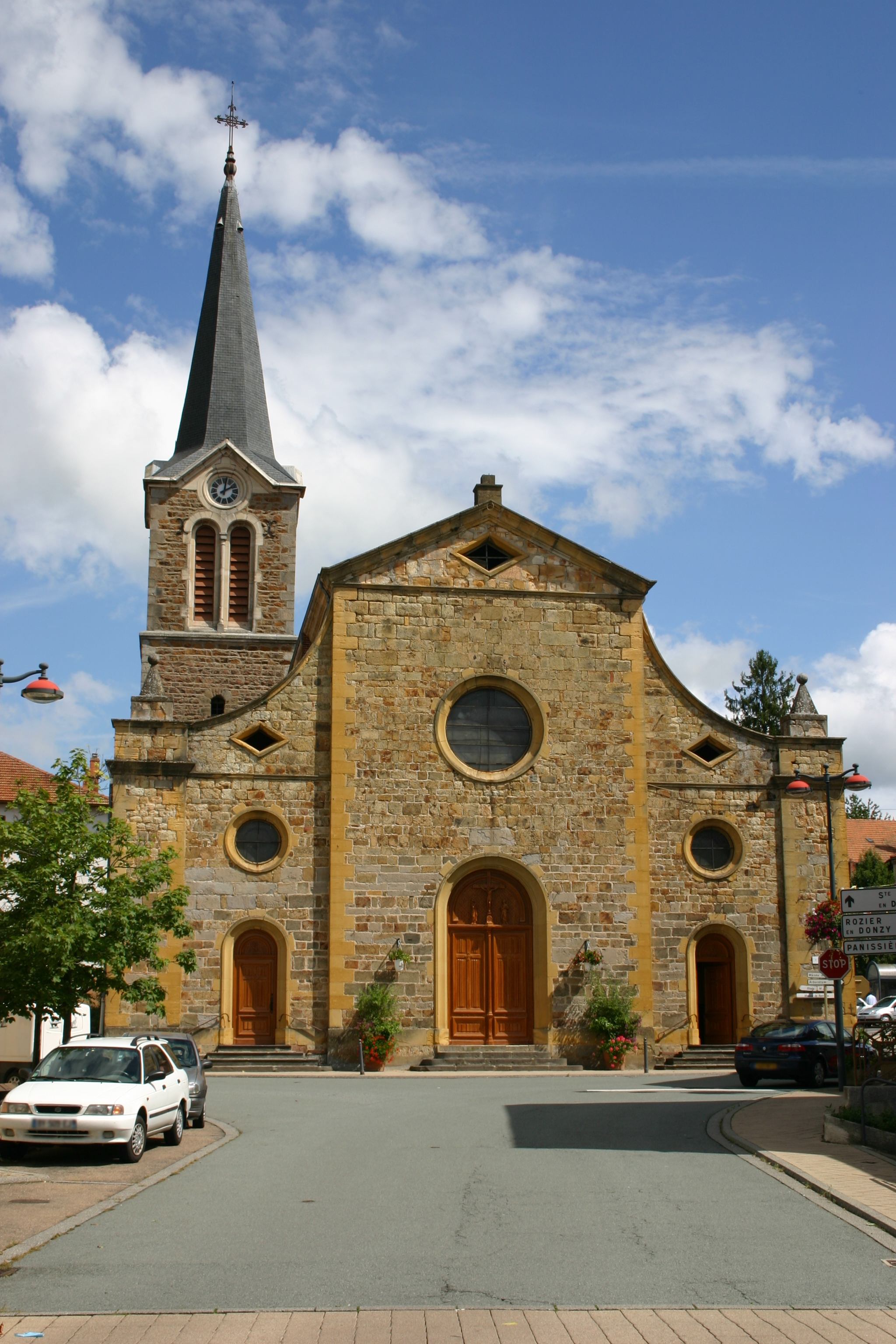 L'église de Bussières dans le département de la Loire.